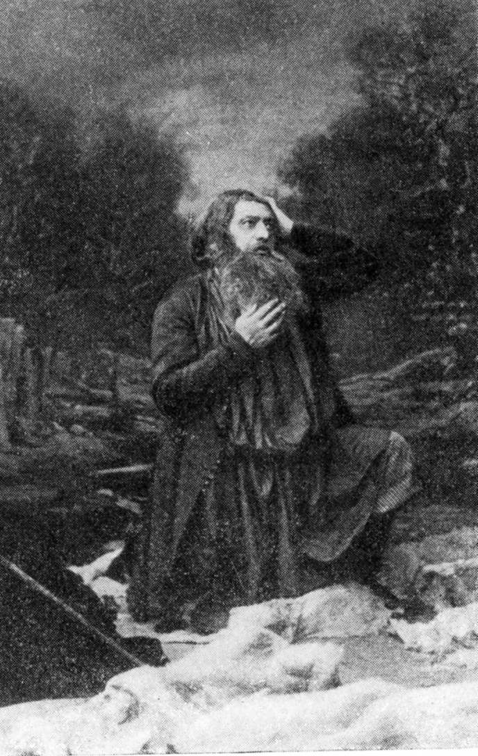 Осип Афанасьевич Петров в роли Сусанина